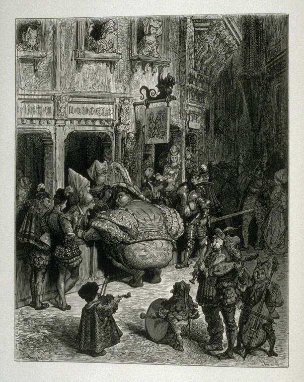 Illustration for Gargantua by François Rabelais, published in Oeuvres de Rabelais (Paris: Garnier Freres, 1873), Book I, ch. XXII, opposite page 69.